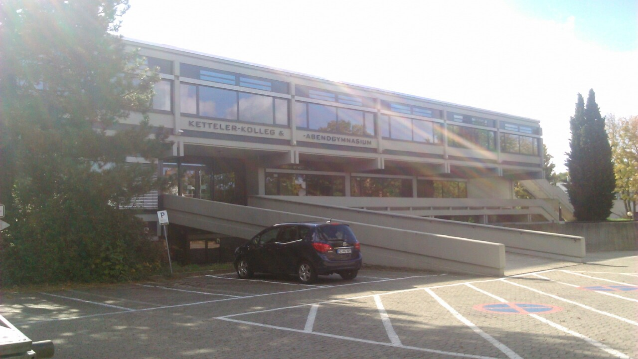 Das Ketteler-Kolleg im Mainzer Stadtteil Hartenberg-Münchfeld